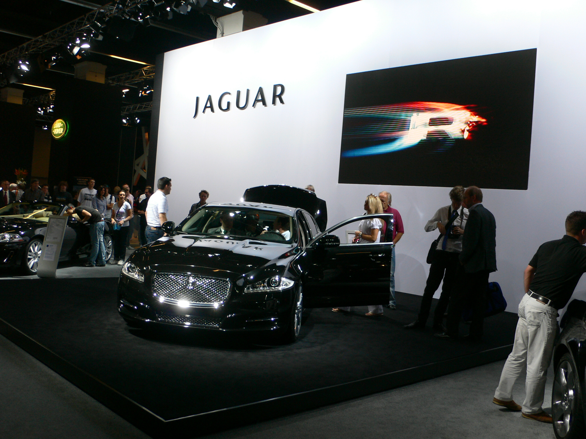 Jaguar XJ au Salon de Francfort 2009